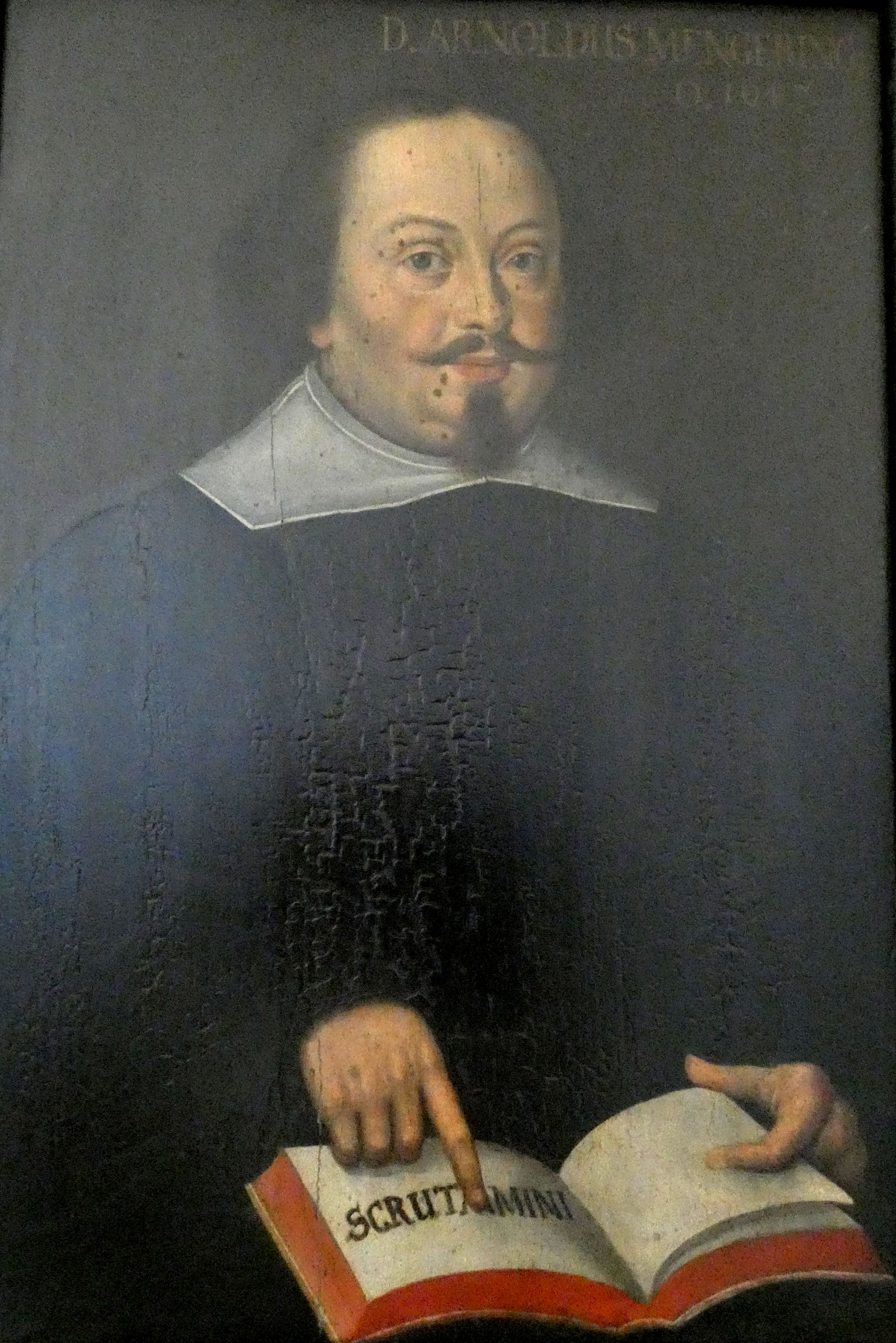 Fotografische Reproduktion eines Porträtgemäldes des Oberpfarrers der Marktkirche Halle Arnold Mengering